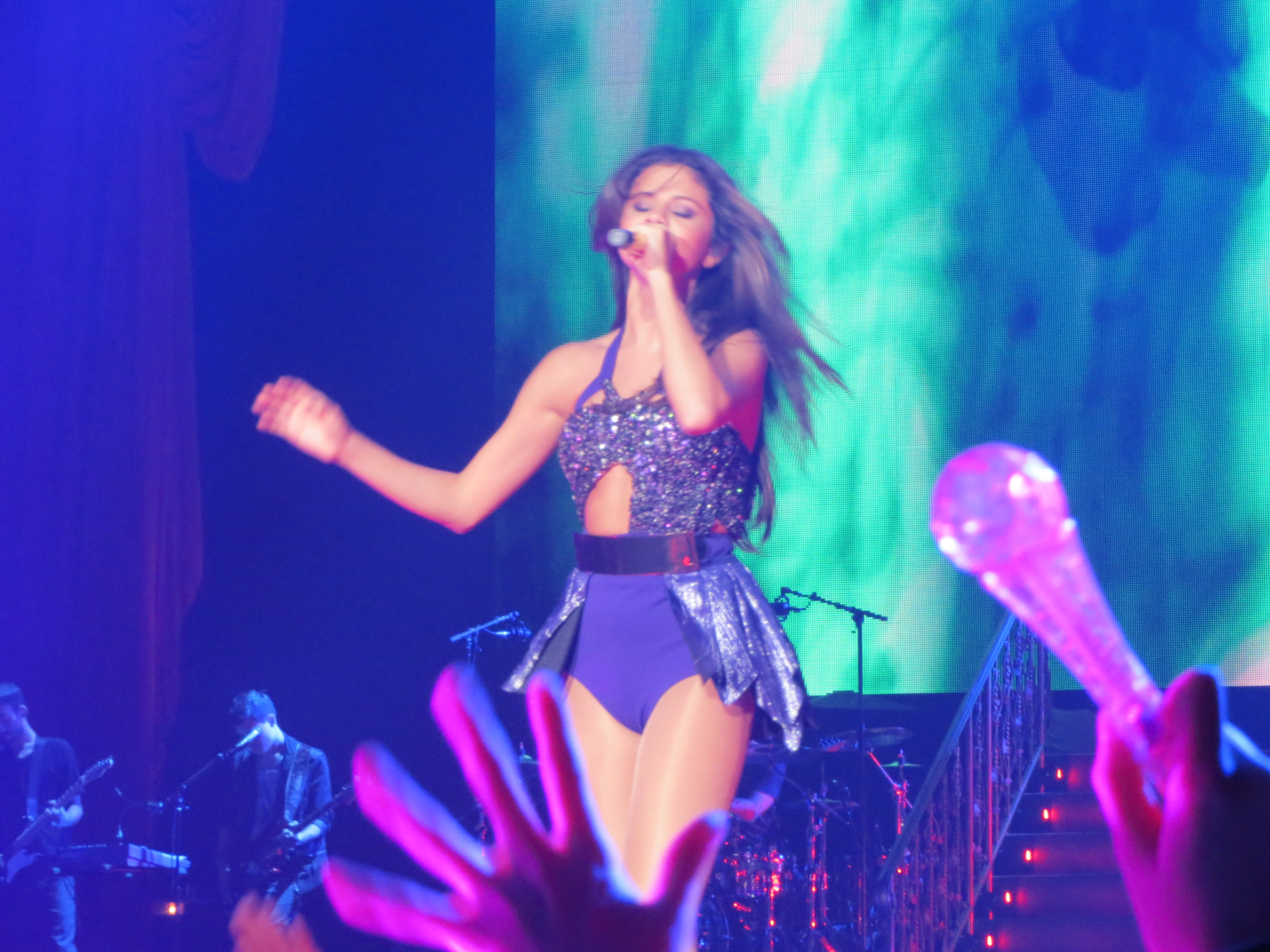 Selena Gomez StarsDance Nov 2013 San Diego, CA